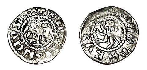 Грошик Руський. Монета Пруського (Галицько-Волинського) князівства 14 ст.